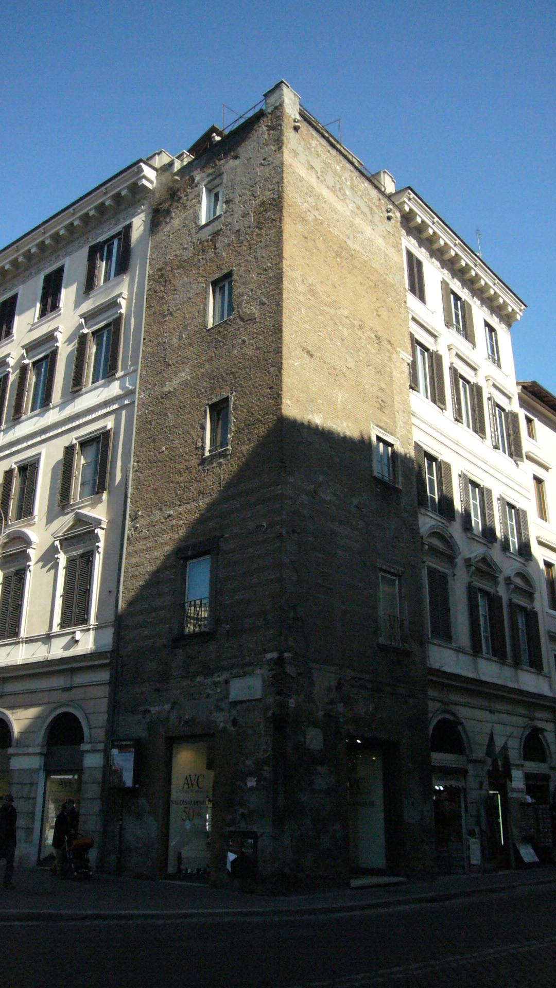 Roma, Tor Sanguigna (dietro Piazza Navona)